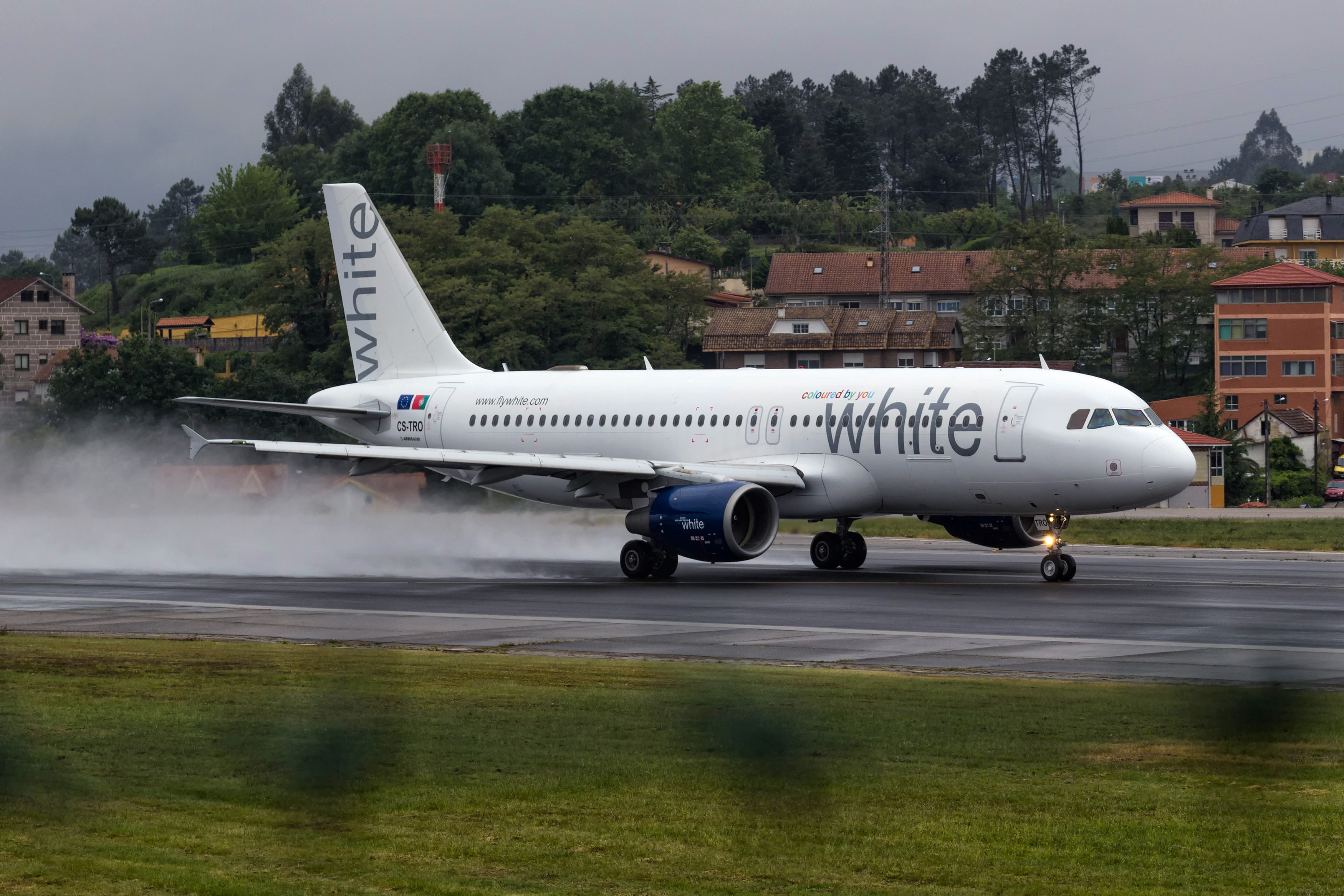 Airbus A320 de White Airways despegando do aeroporto de Vigo.